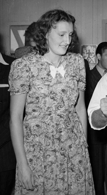 Aankomst op Schiphol van de zwemsters Iet Koster-van Feggelen, 26 augustus 1947 Foto Ben van Meerendonk / AHF, collectie IISG, Amsterdam